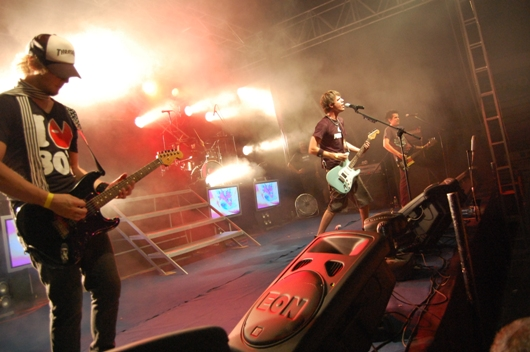 Foto de la banda Area 69 en el concierto lanzamiento de "12 RAZONES PARA..."